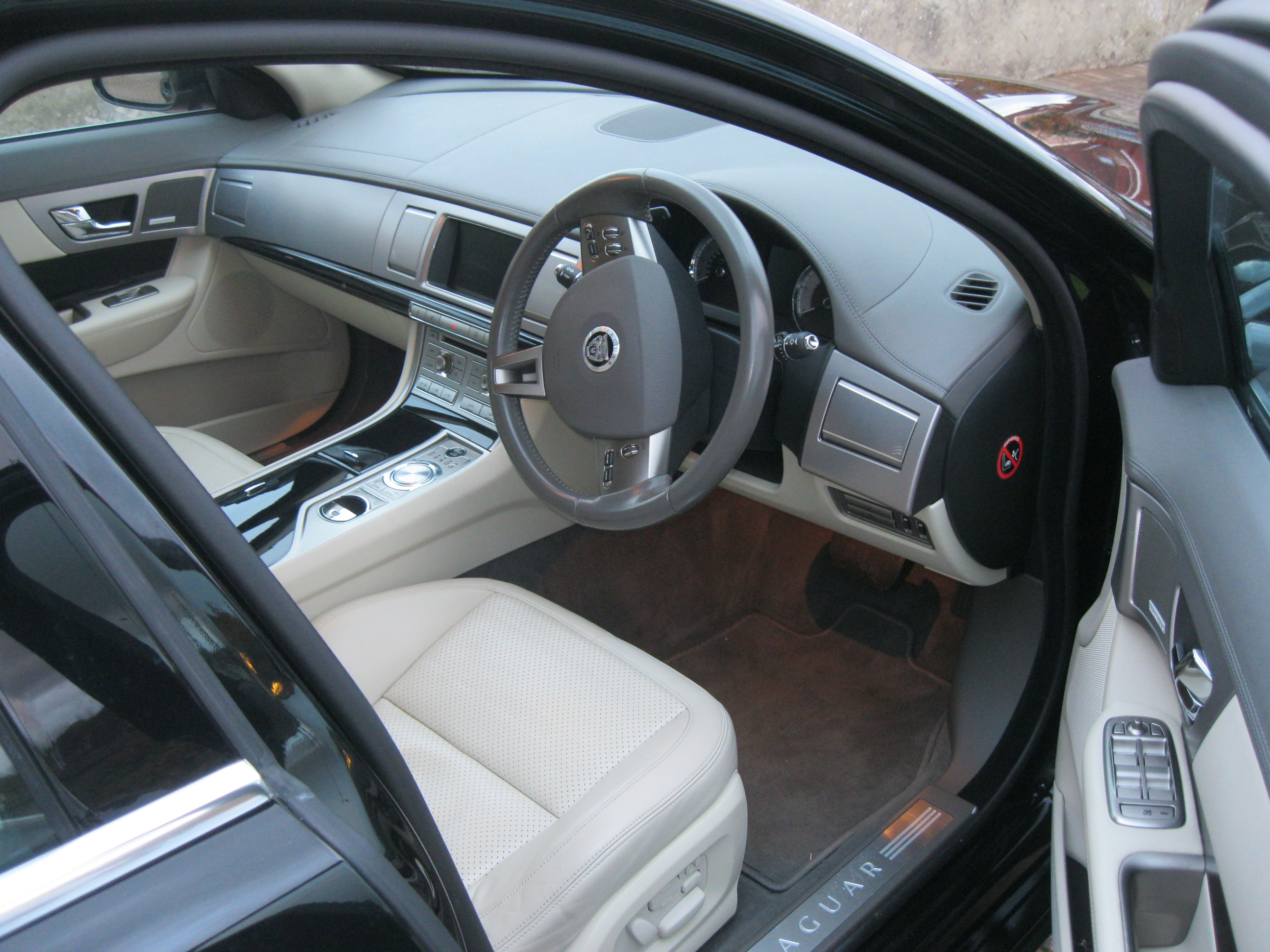 Dream machine. December 2013.